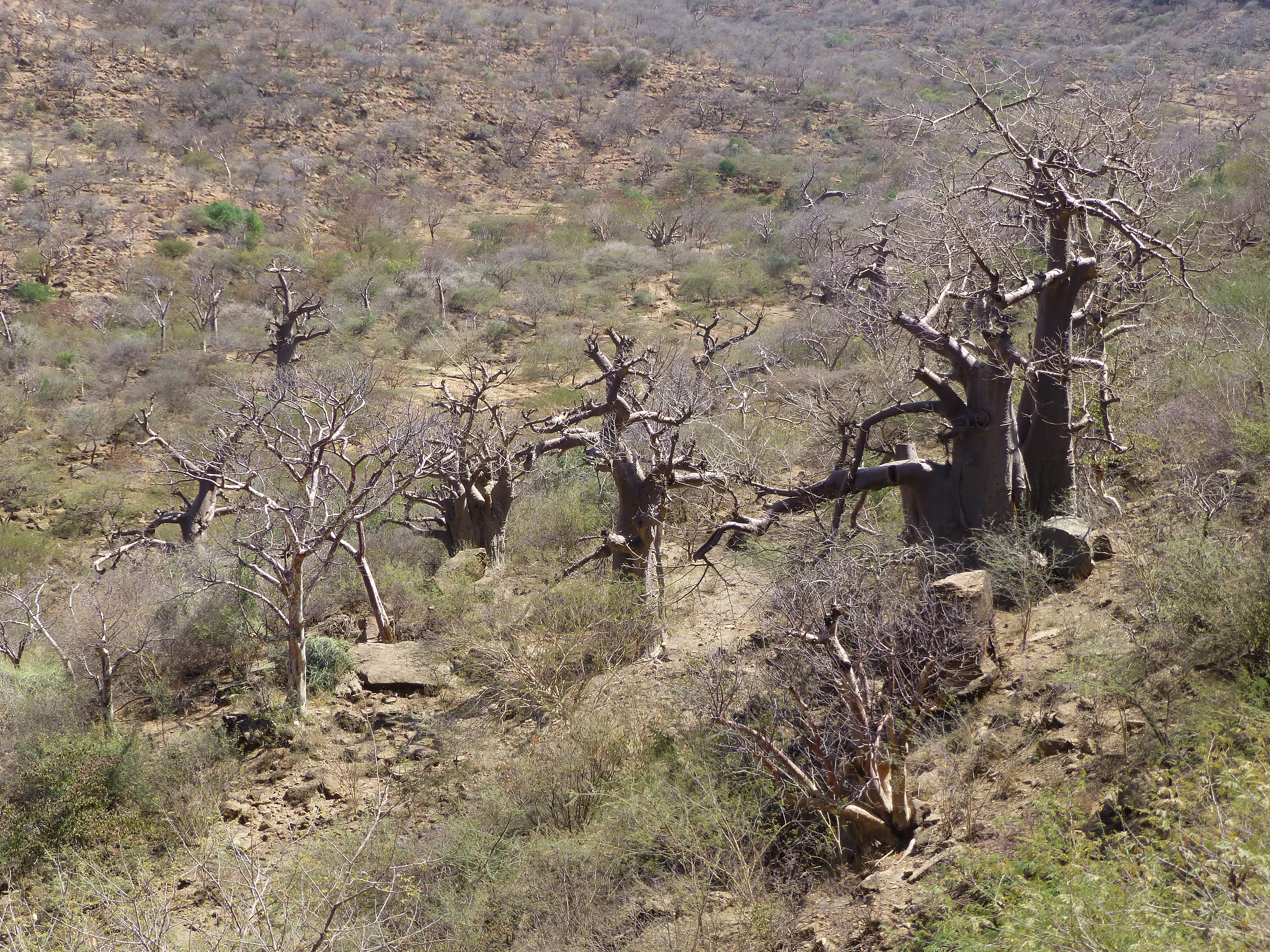 Ethiopie, région du Tigray : la vallée des baobabs